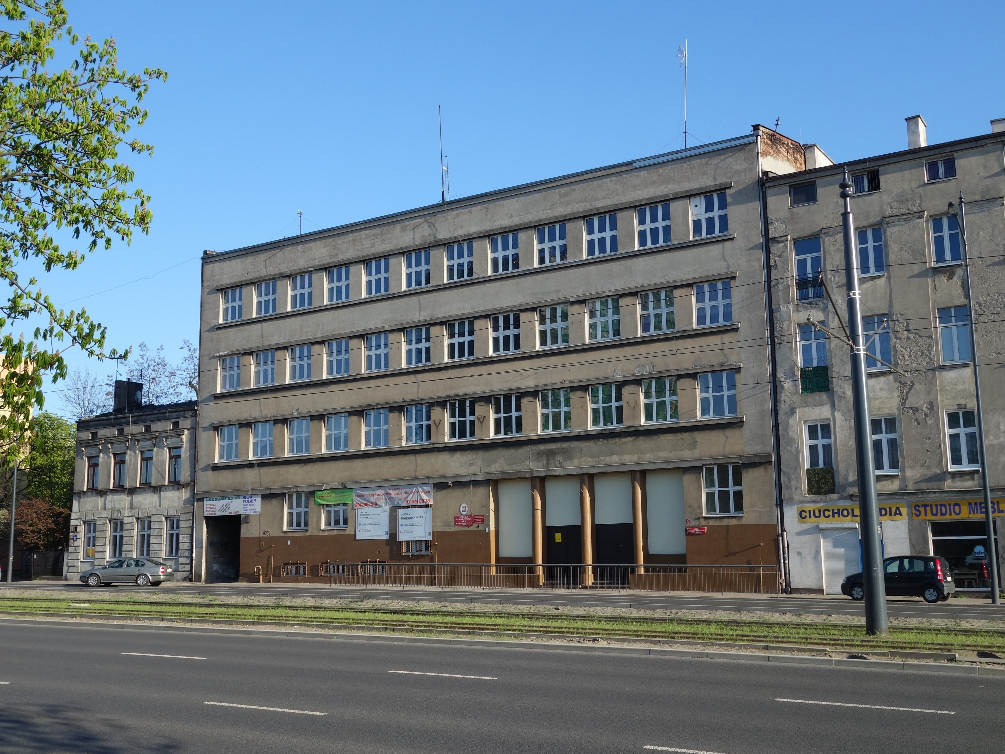 Grundschule (Szkoła Podstawowa) Nr. 4 der Stadt Łódź in der heutigen Aleja Józefa Piłsudskiego 101 (Piłsudski-Allee); das Gebäude (hier die Ansicht von Norden) beherbergte während der deutschen Besatzung von 1941 bis 1944 die Günther-Prien-Schule (anfangs als Staatliche Oberschule für Jungen II bezeichnet); die Adresse lautete damals Ostlandstraße 191.